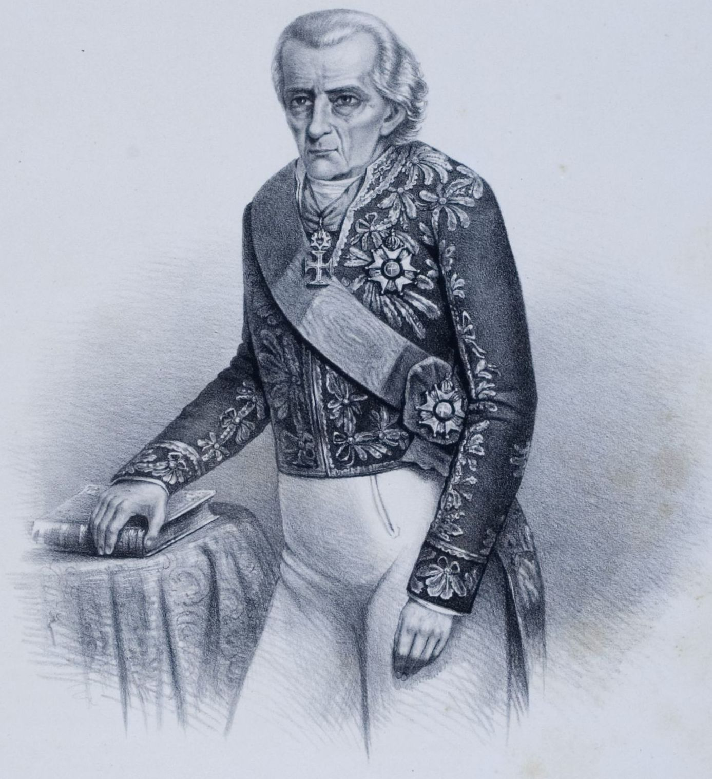 Litografia em preto e branco